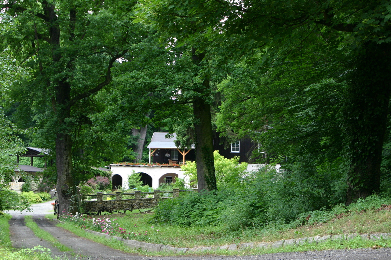 Rogów Opolski - wieś w Polsce, w powiecie opolskim.